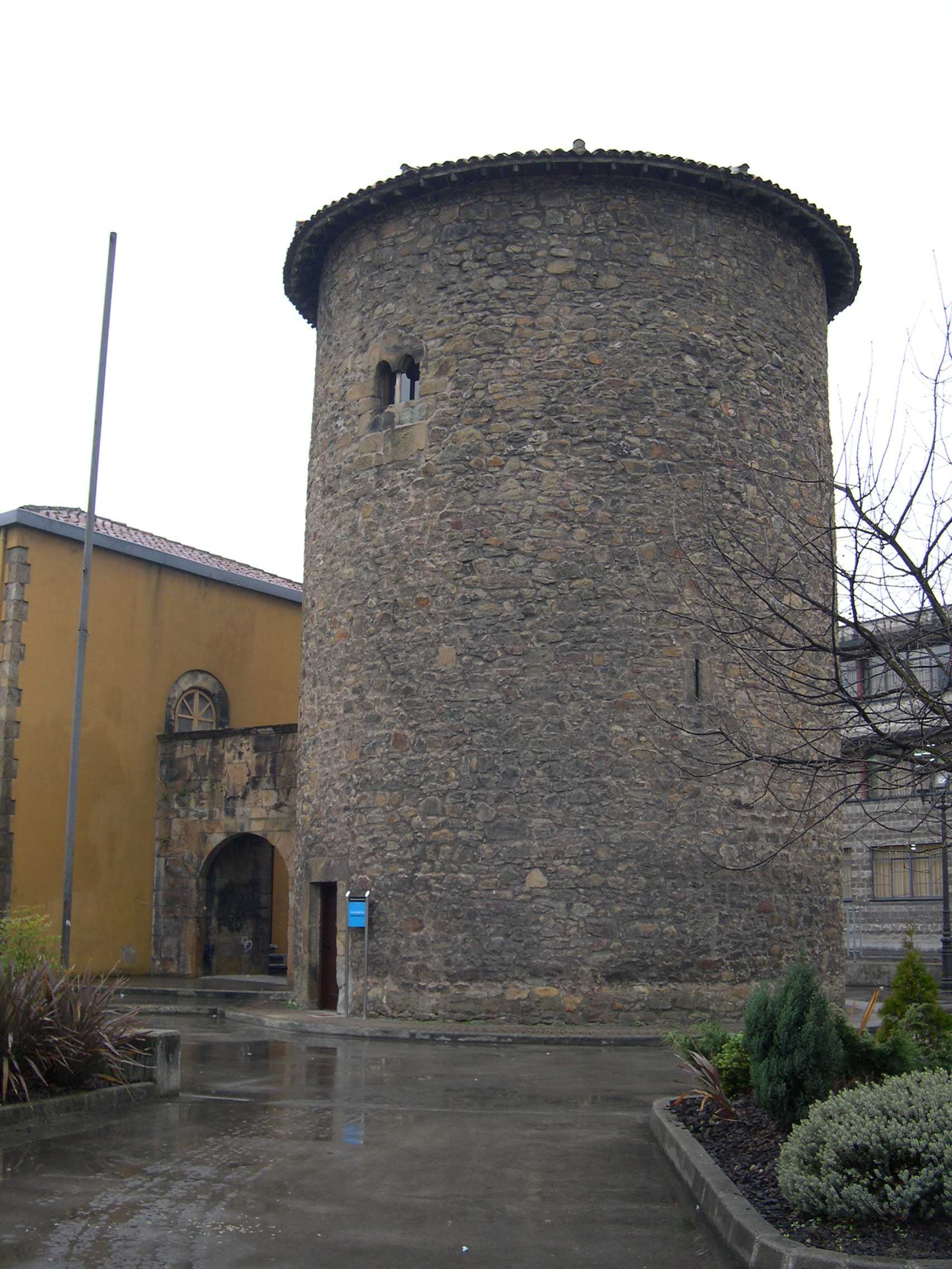 Torre de la Quintana en Ciañu